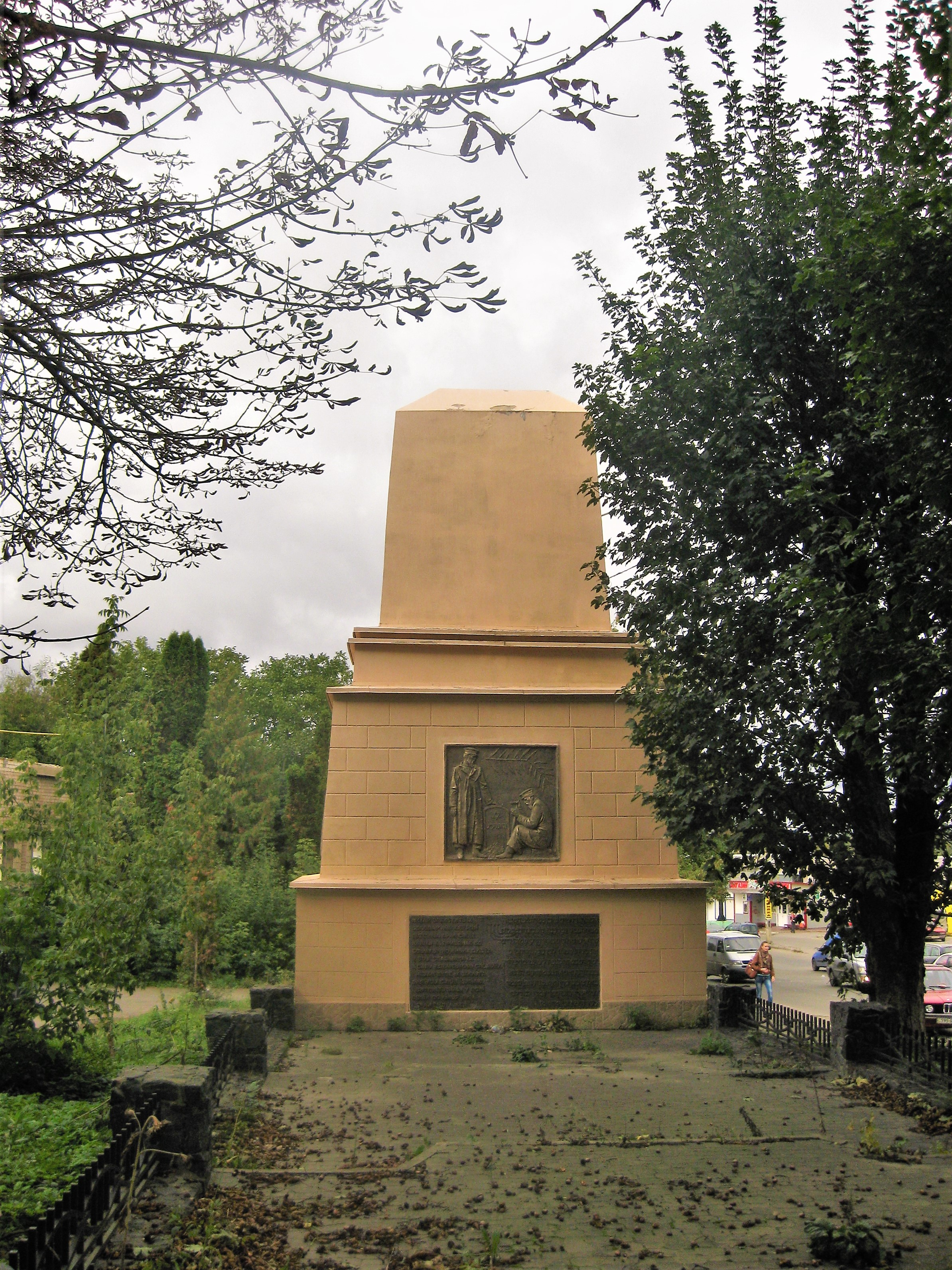 Братська могила жертв петлюрівського погрому, Хмельницький, вул. Толстого, 3